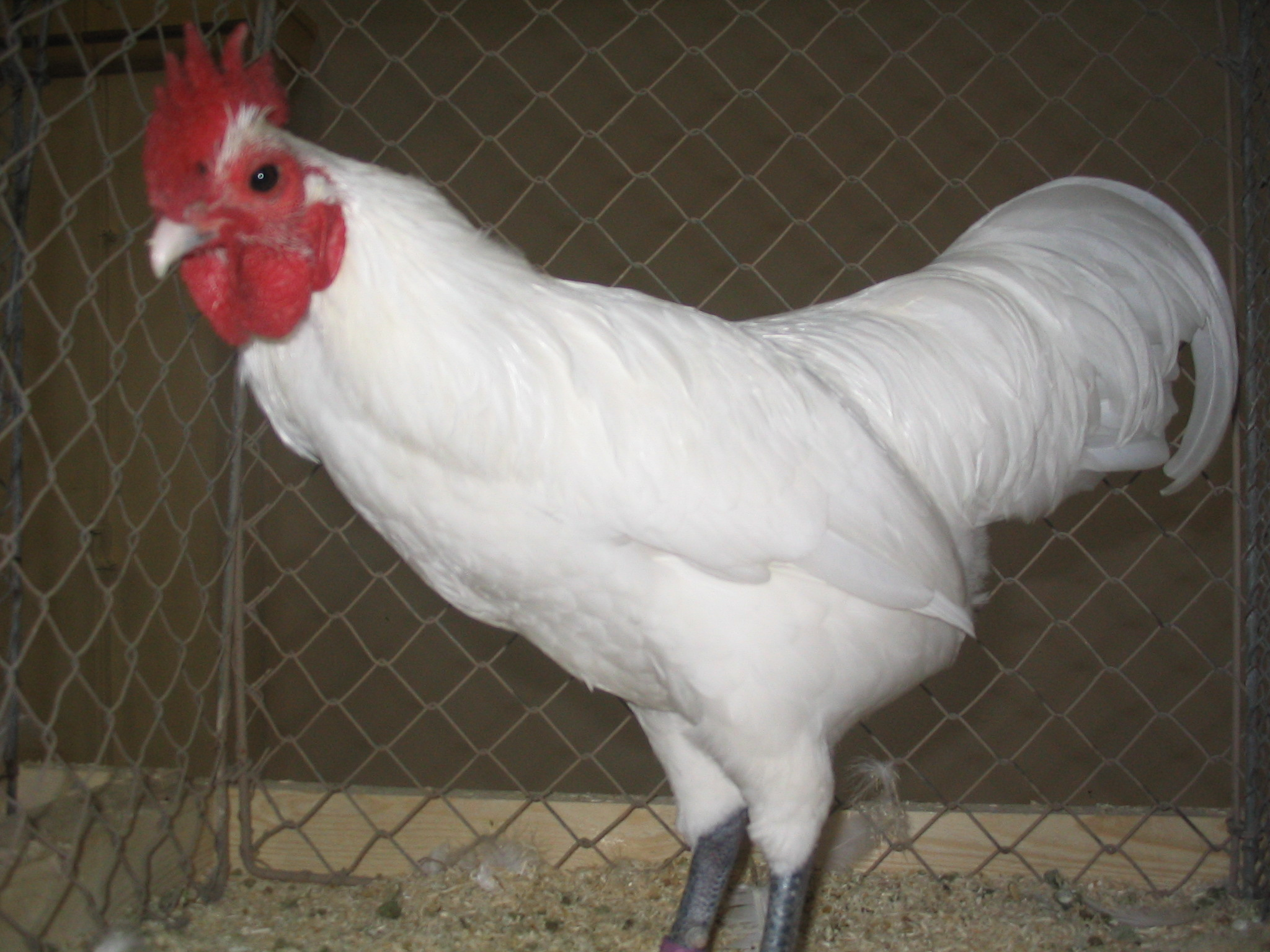 Weißer Zwergaustralorpshahn, Aufgenommen am 28.10.2007 von Dr. Hagen Graebner